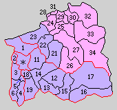 後の鳥取県岩美郡域の町村制時点の町村。